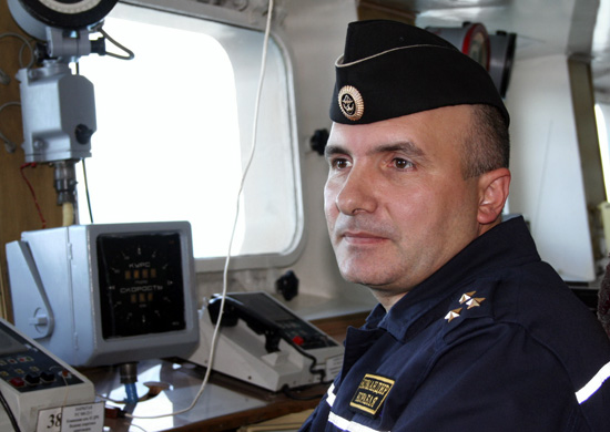 Командир ТАВКР «Адмирал Флота Советского Союза Кузнецов» капитан 1 ранга Сергей Артамонов